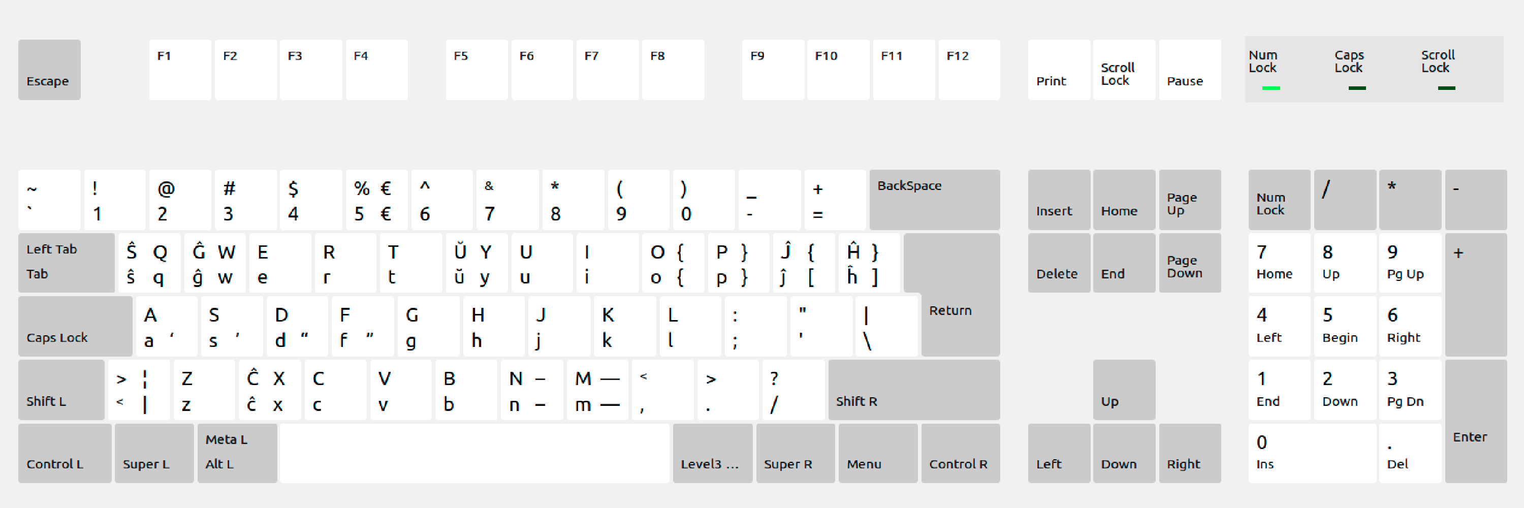 Disposition des touches du clavier pour l’espéranto.